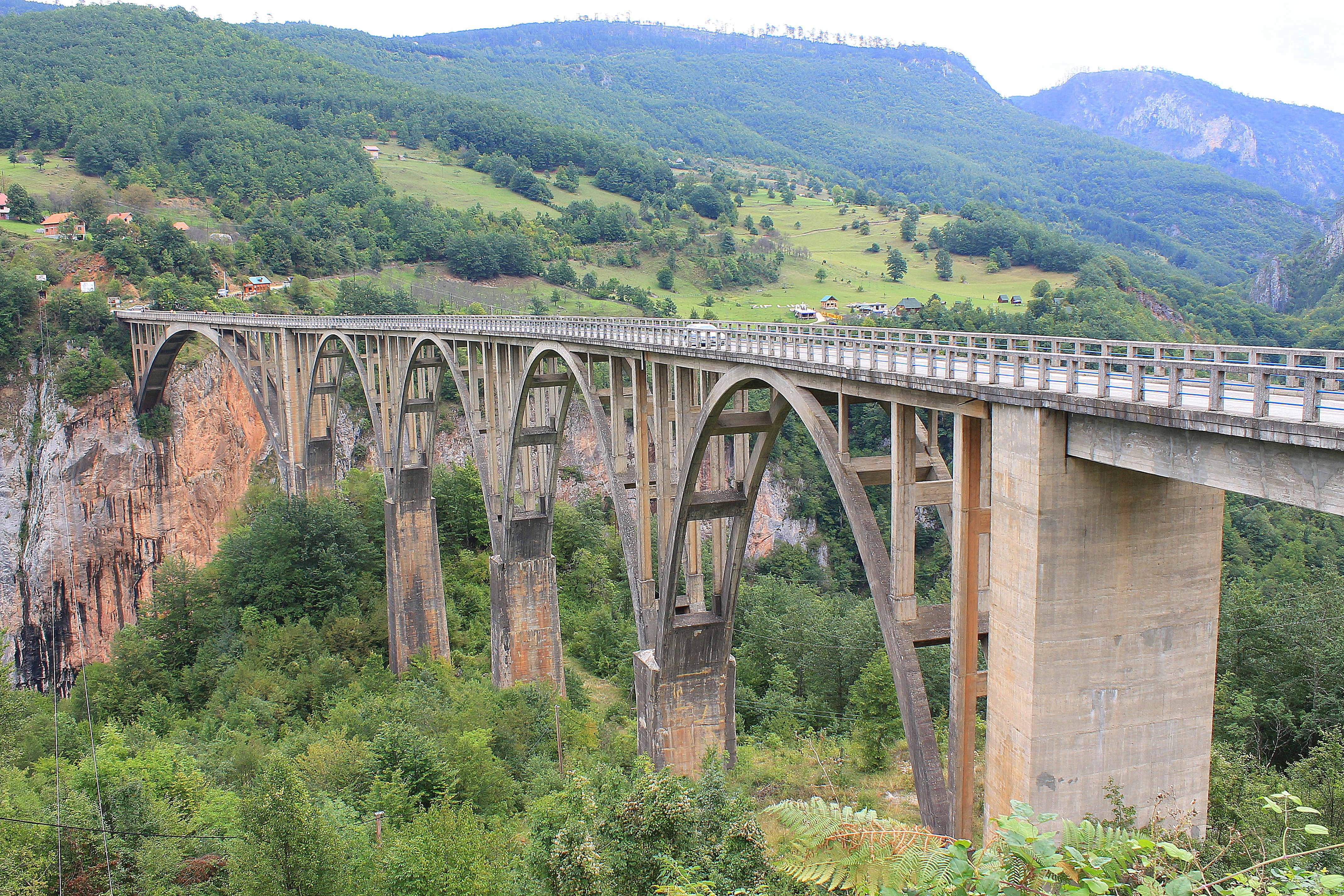 Đurđevića Tara Bridge